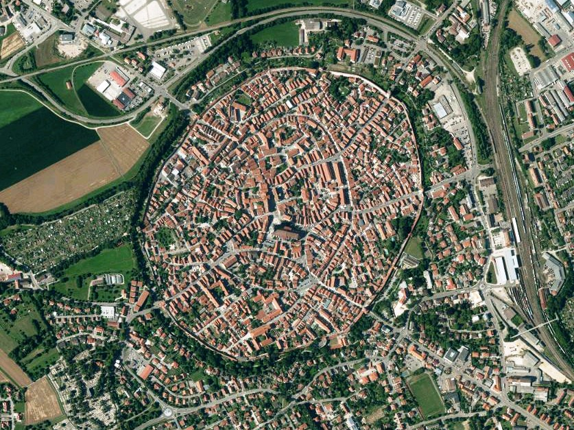 Luftaufnahme der Bayerischen Vermessungsverwaltung: Innenstadt von Nördlingen, Landkreis Donau-Ries, Bayern.